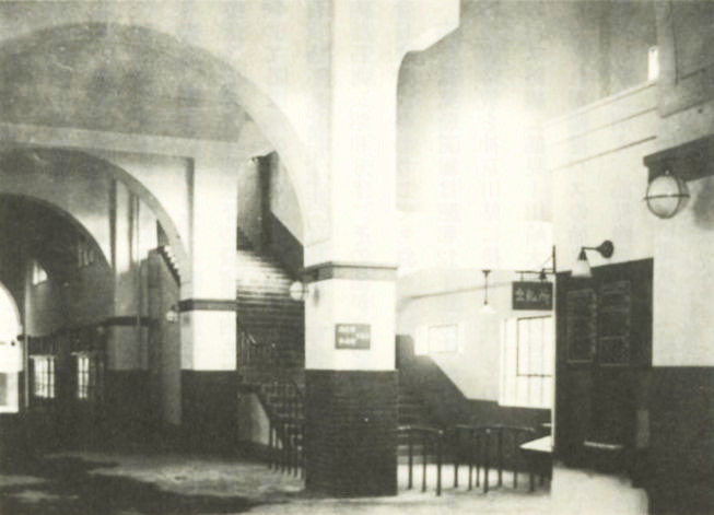 開業時の国道駅